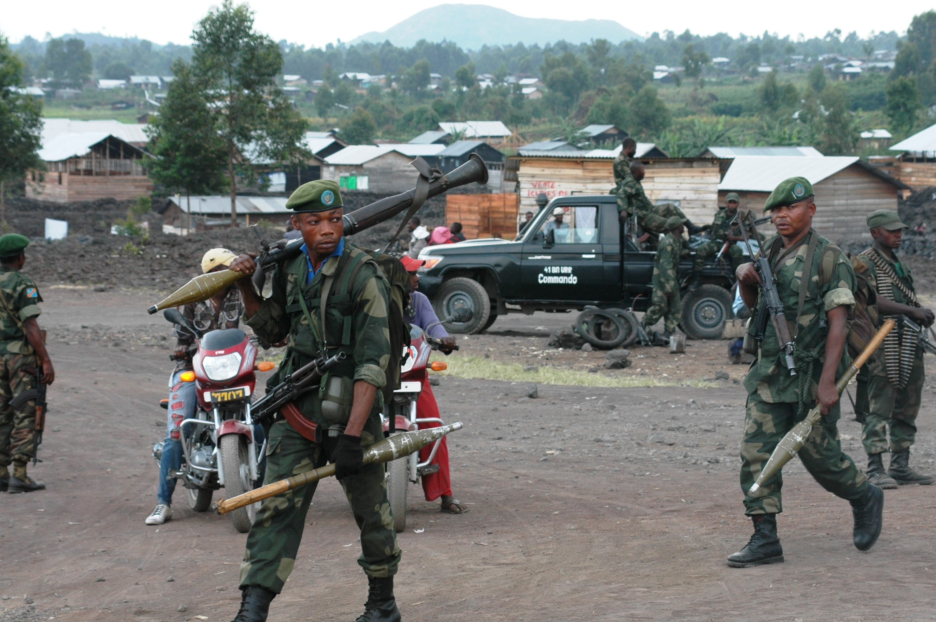 Les FARDC et la MONUSCO renforcent leur présence à l'intérieur de Goma et ses environnants suite à un deuxième jour 921 mai 2013) de combats entre le M23 et les forces nationales de défense. © MONUSCO/Clara Padovan